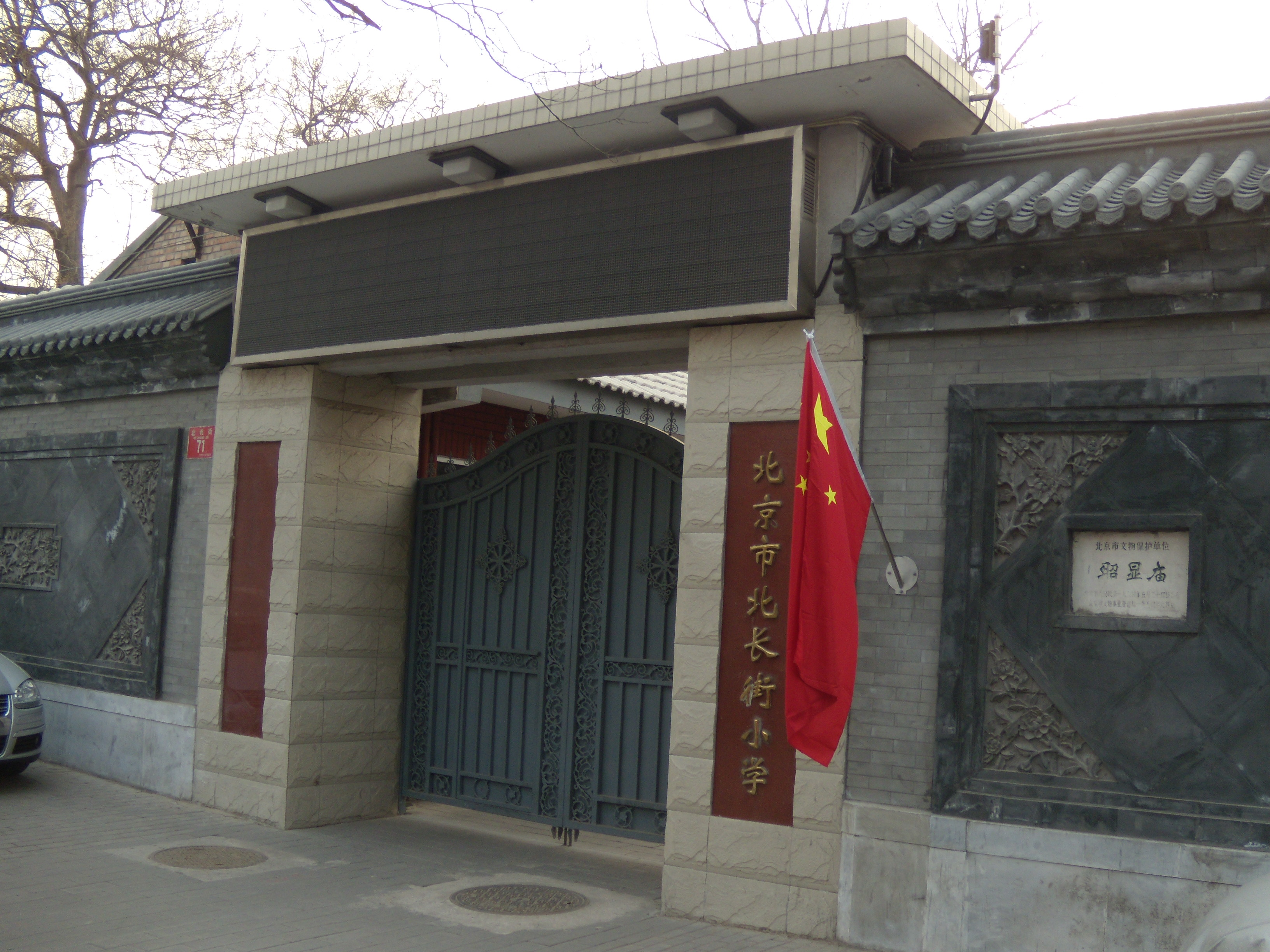 中文（中国大陆）: 昭显庙，现仅存影壁及后殿，现为北京市北长街小学。